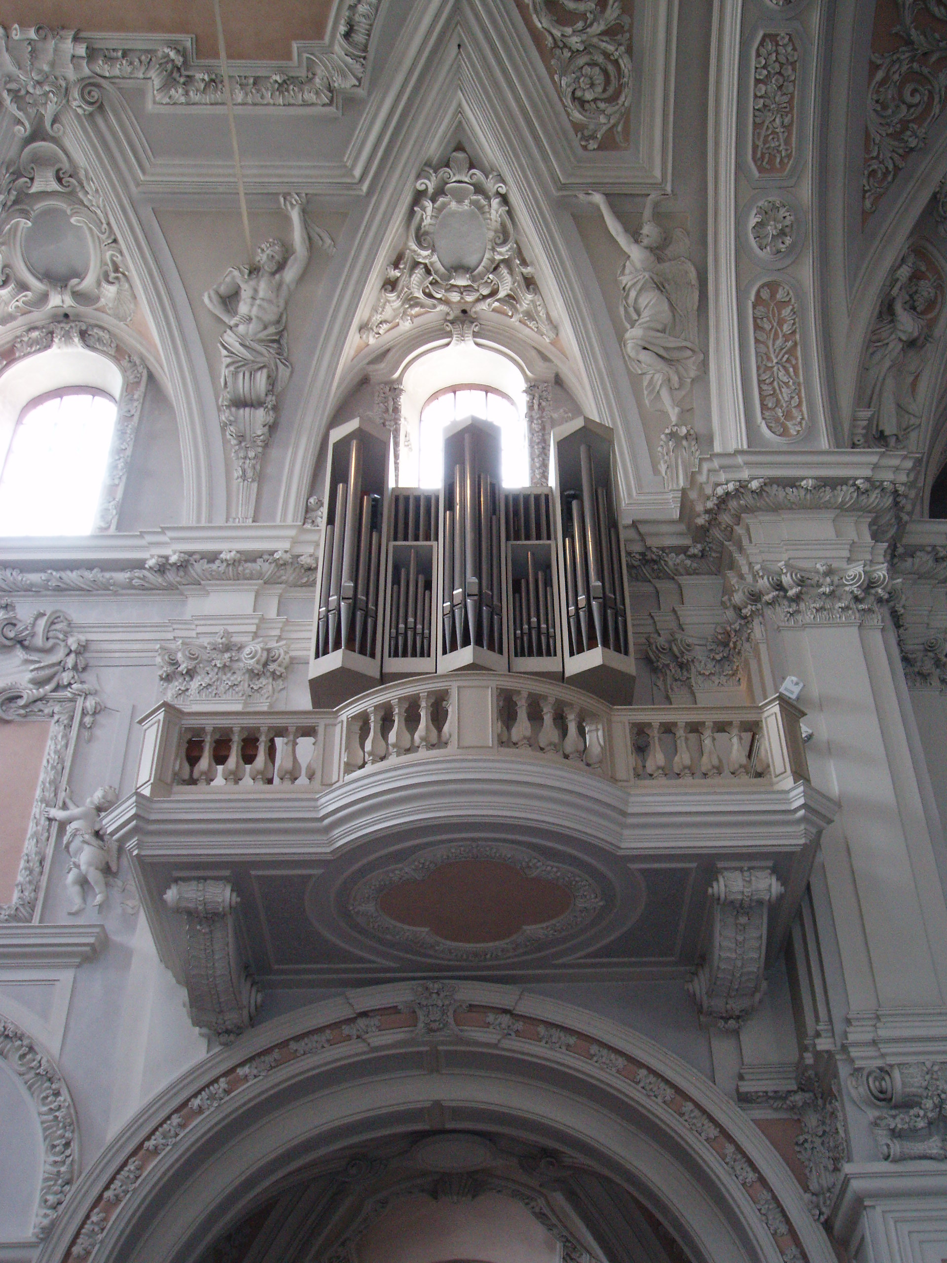 Chororgel 1 im Würzburger Dom